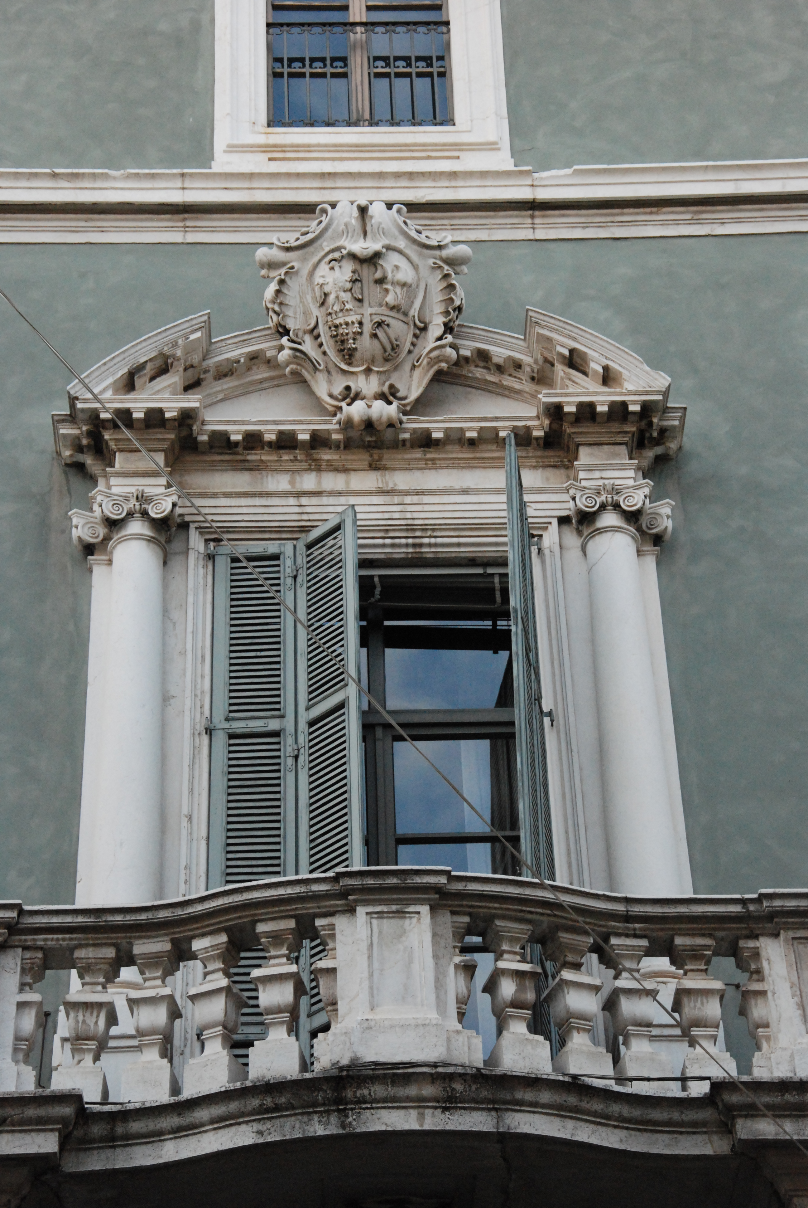 sant'alessandro (brescia) portale laterale part.jpg